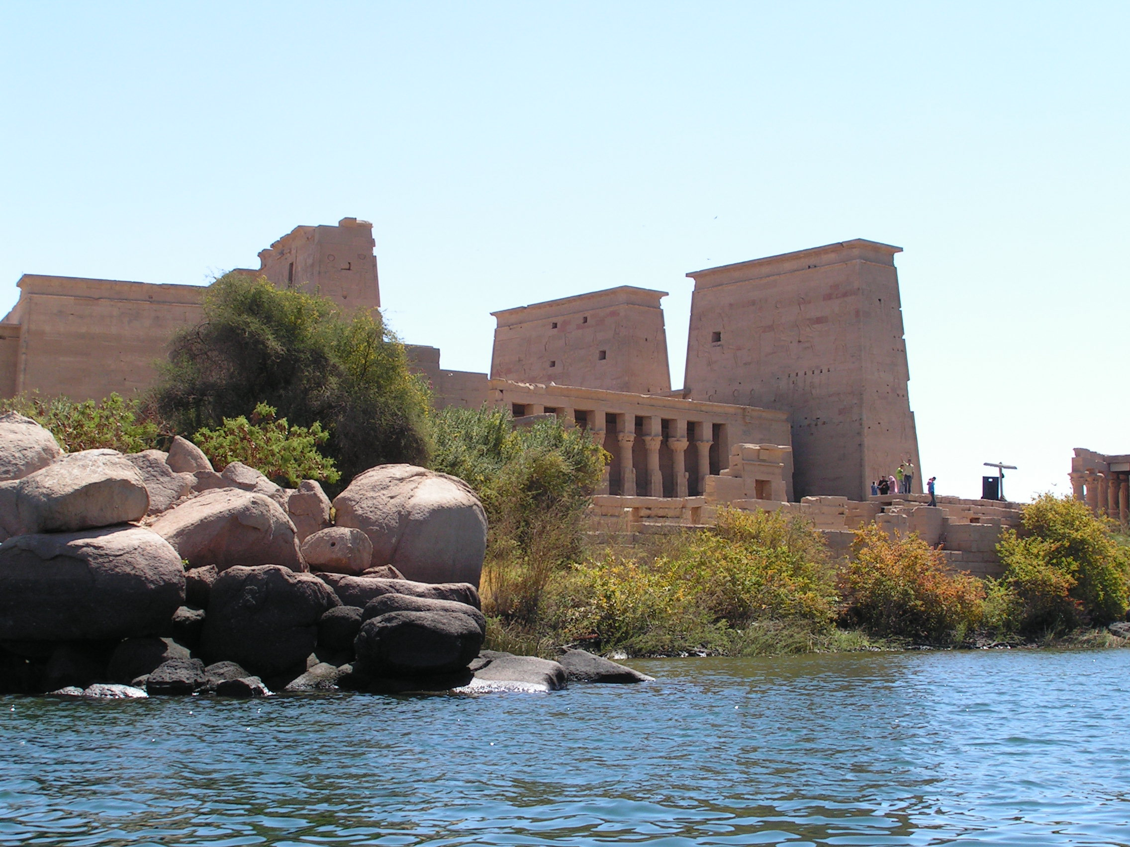 Zicht op Philae